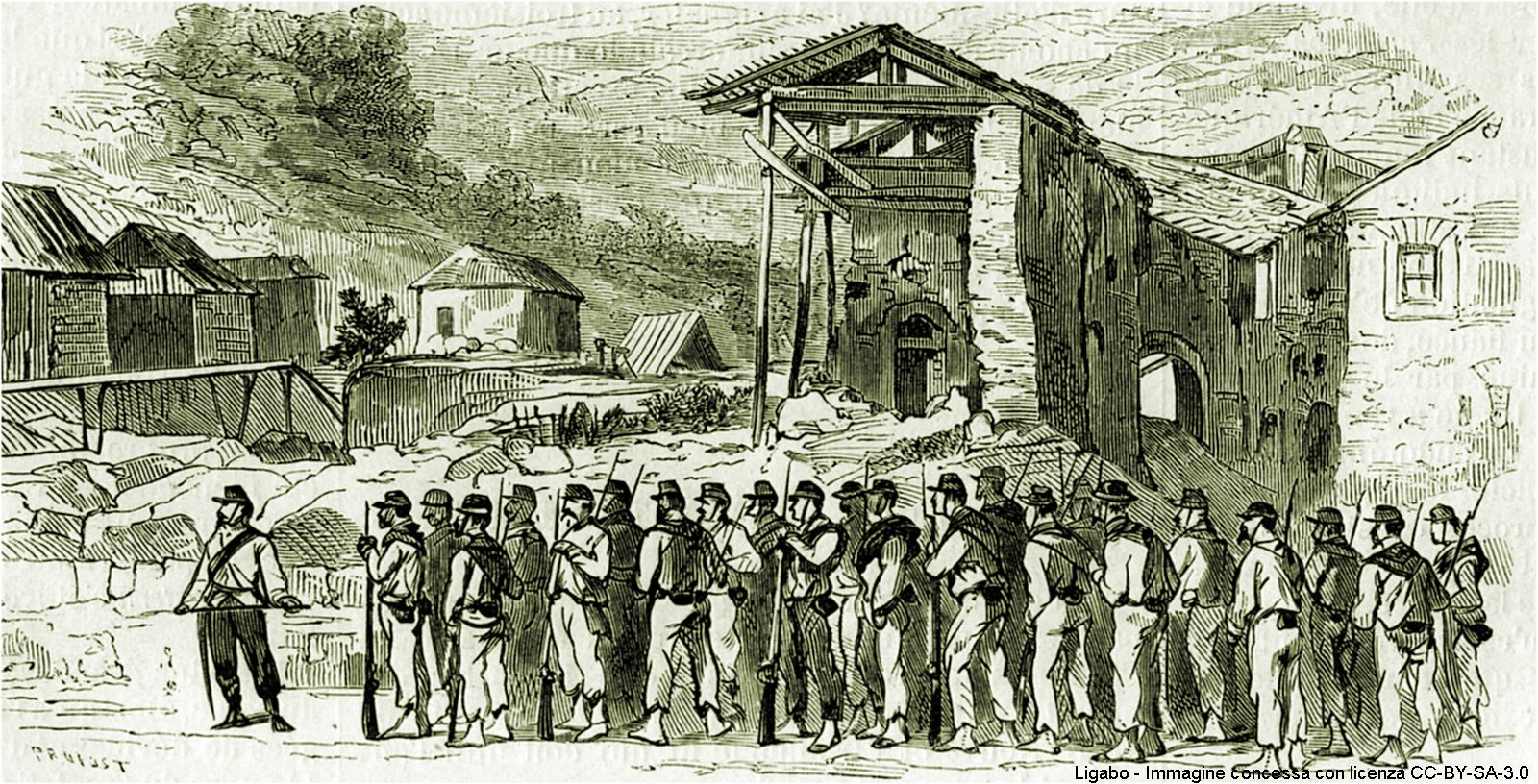 L'avanguardia dei garibaldini guidata dal capitano Antonio Malagrida si spinge fino a Vezza d'Oglio il 29 giugno 1866